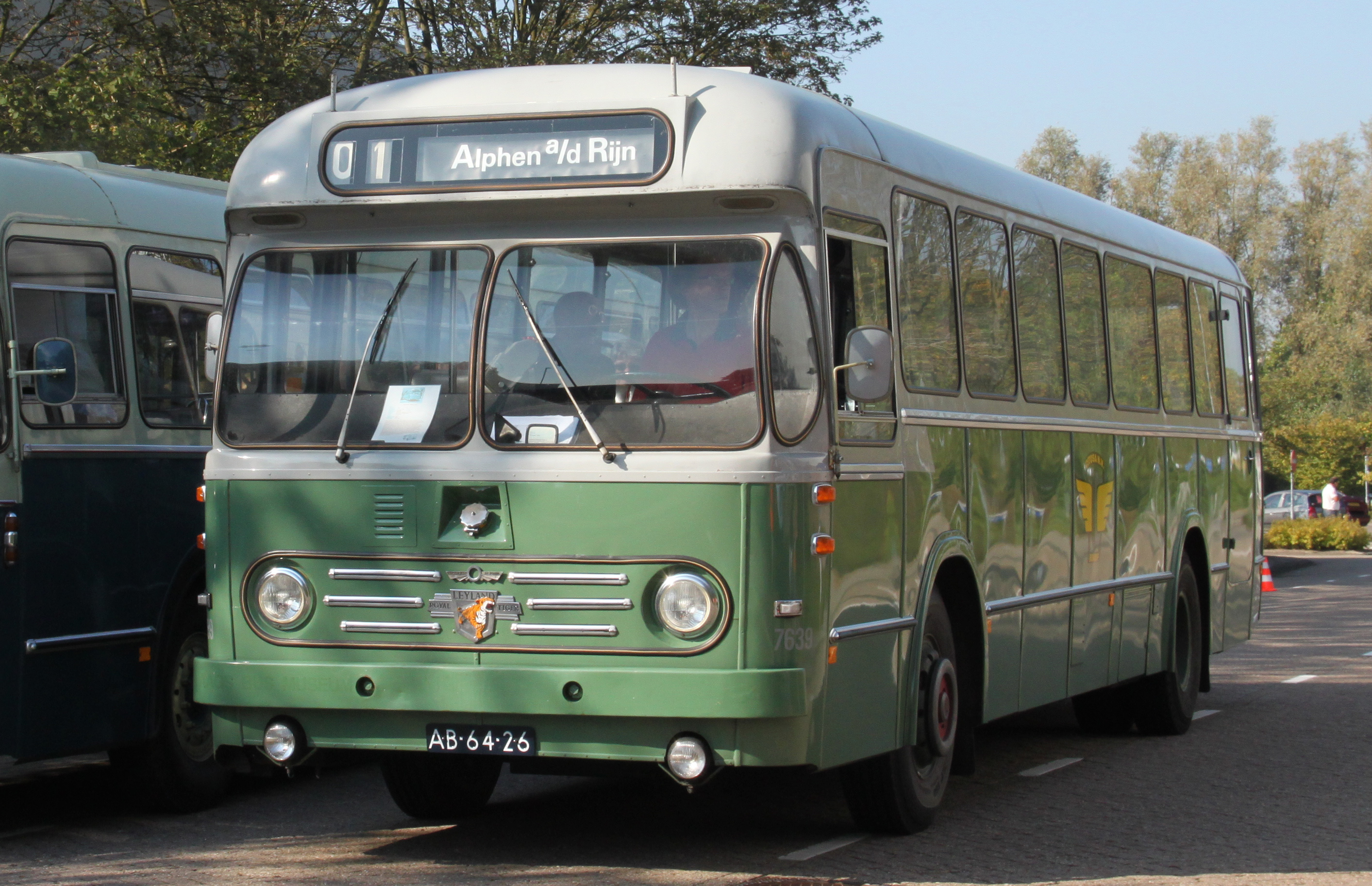 De Citosa 7639 van het Haags Bus Museum in Eindhoven.